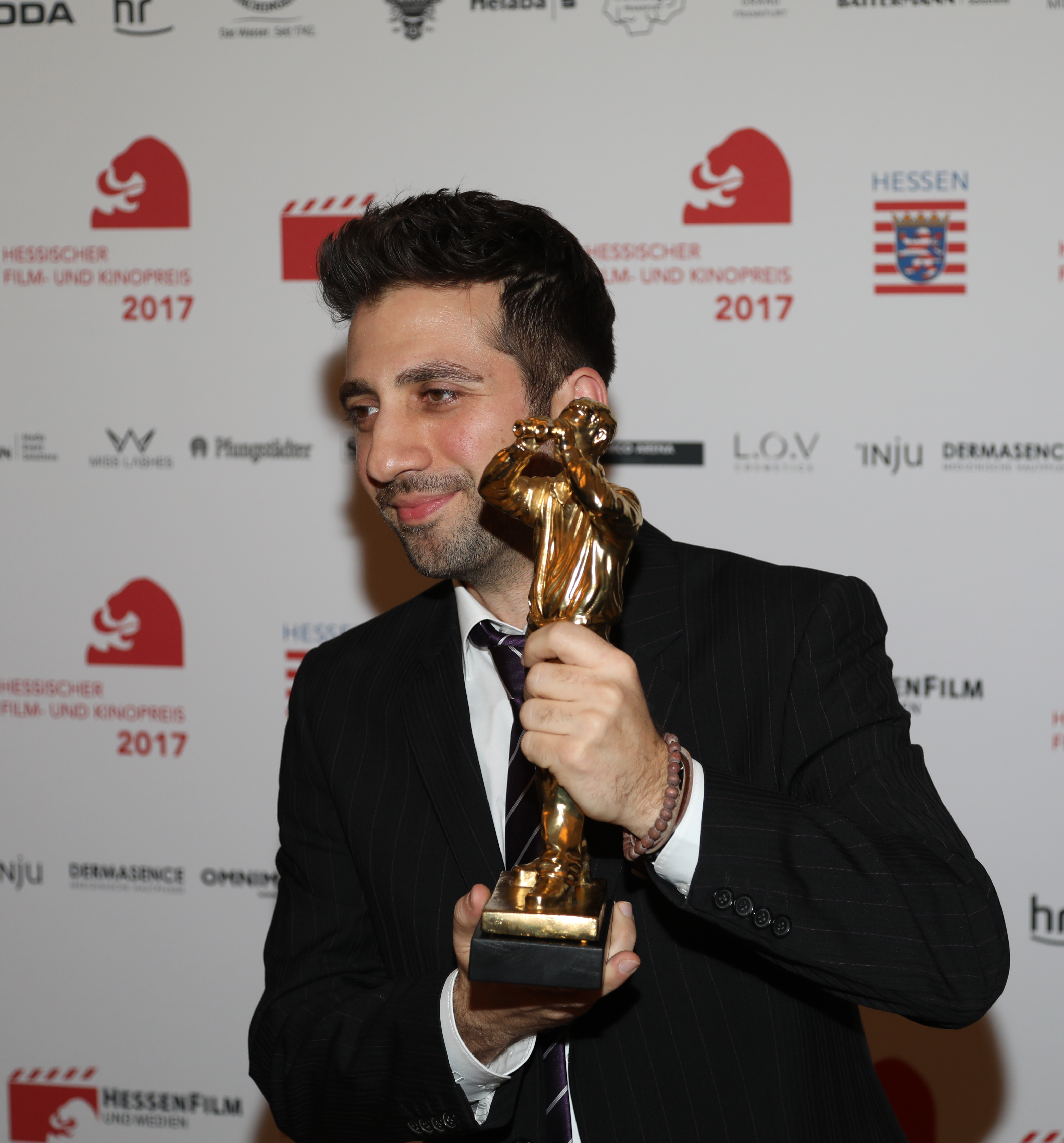 Özgür Yildirim beim Hessischen Film- und Kinopreis 2017